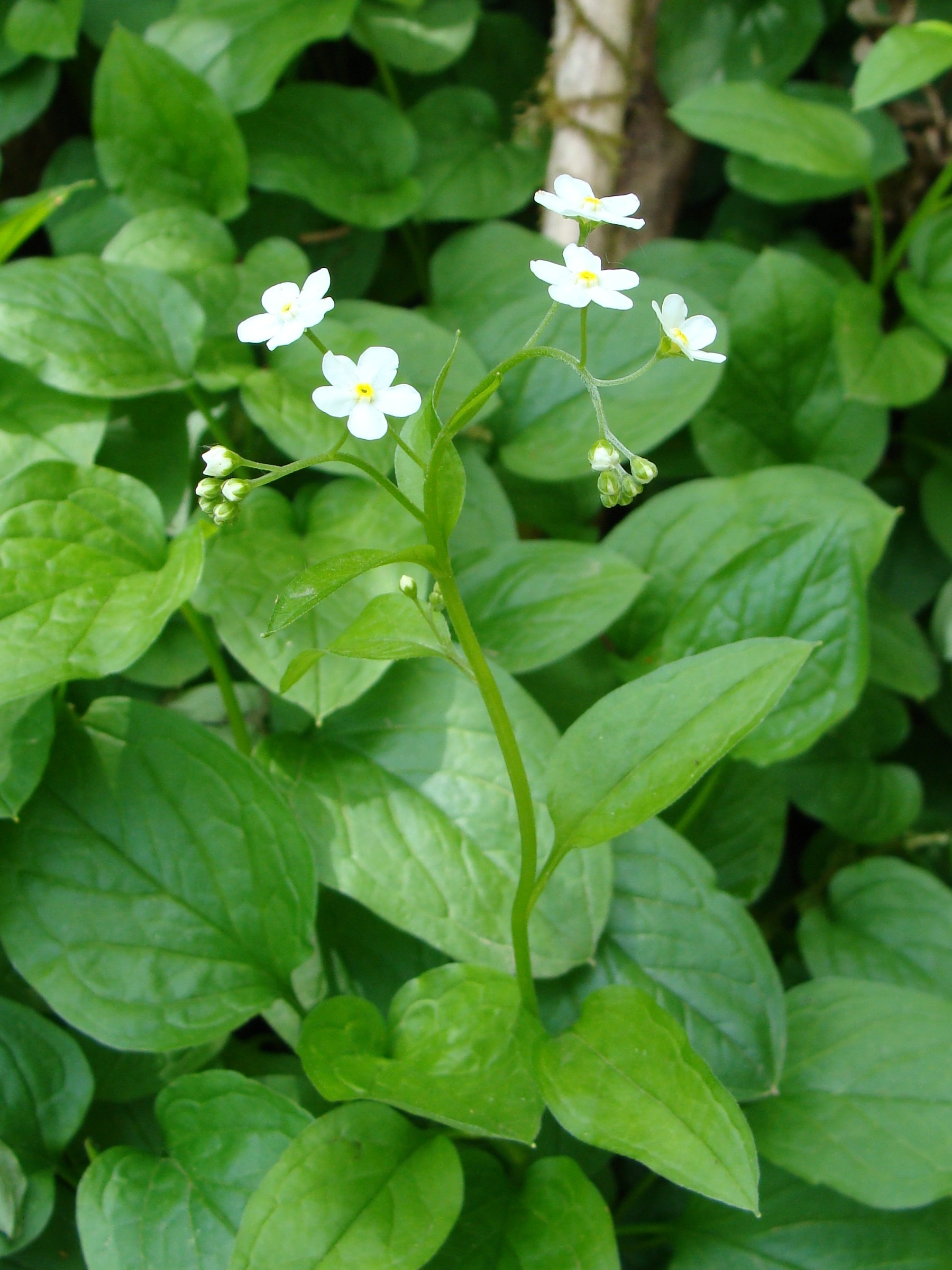 Trigonotis guilielmi （ムラサキ科キュウリグサ属タチカメバソウ）